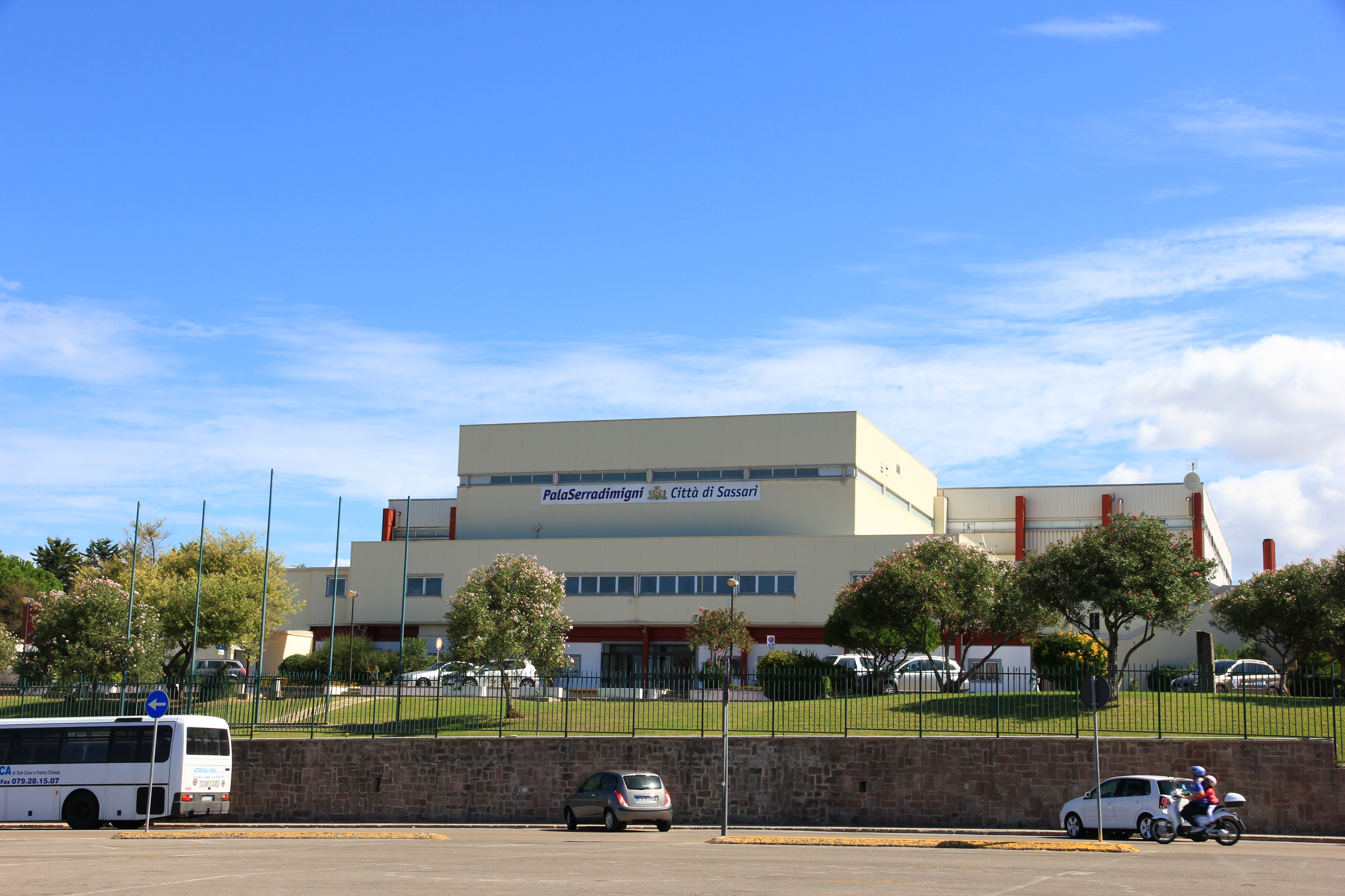 Sassari